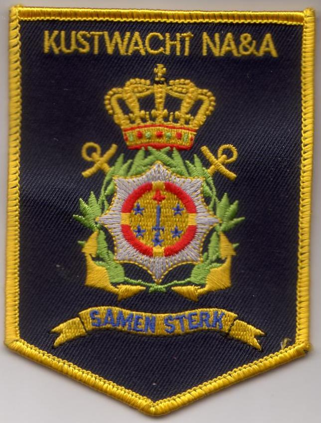 Kustwacht Nederlandse Antillen en Aruba